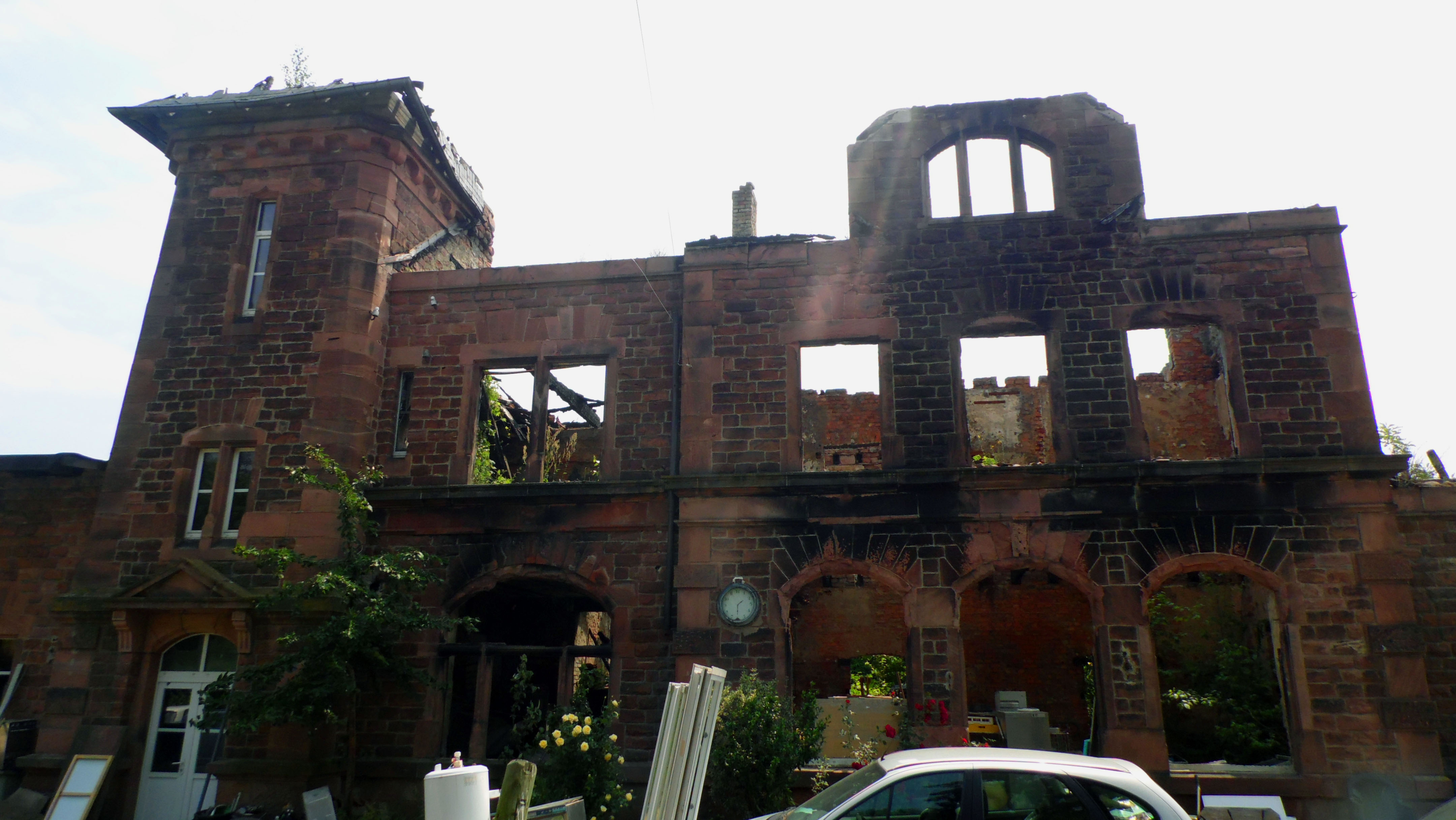 Les restes de la gare de Saint-Hippolyte, ravagée par un incendie le 19 février 2010.